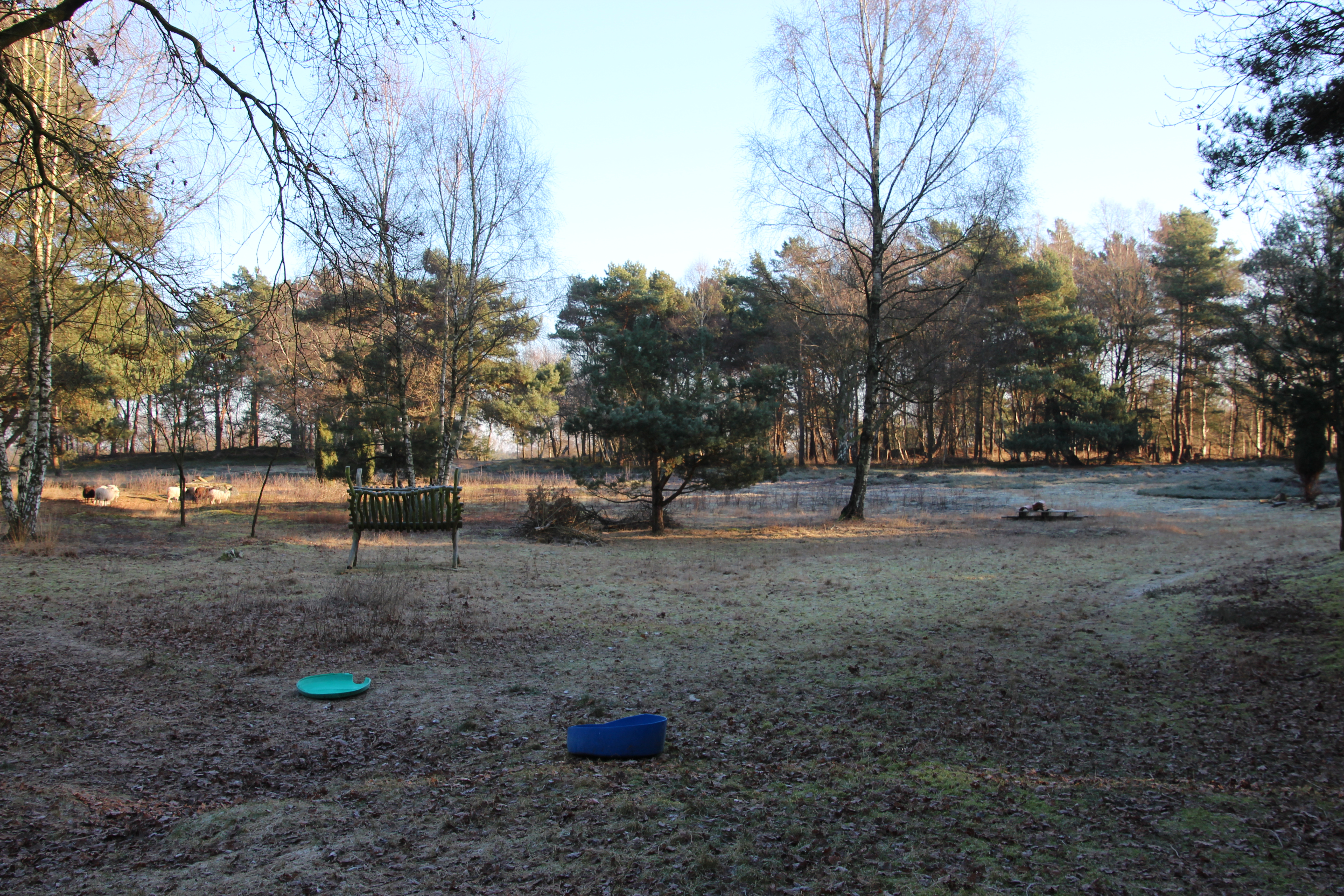 Umzäuntes Gelände mit den Hügelgräbern in der Neegenbargsheide.